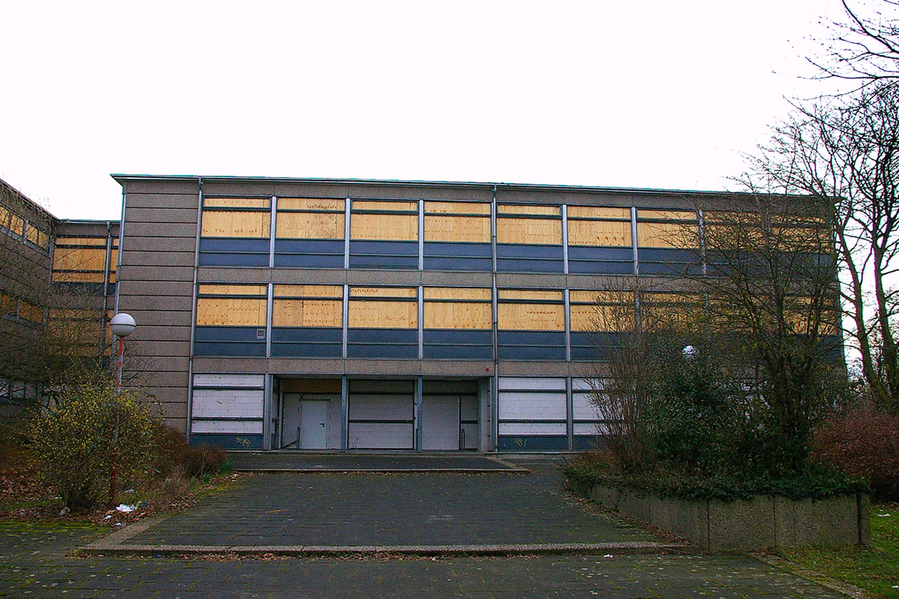 Das ehemalige Gebäude der Adolf-Reichwein-Realschule in Witten. Es wurde zwischen 1965 und 2005 genutzt. Das Foto entstand im März 2007, kurz nach dem Zumauern der Fenster und Türen des Erdgeschosses.